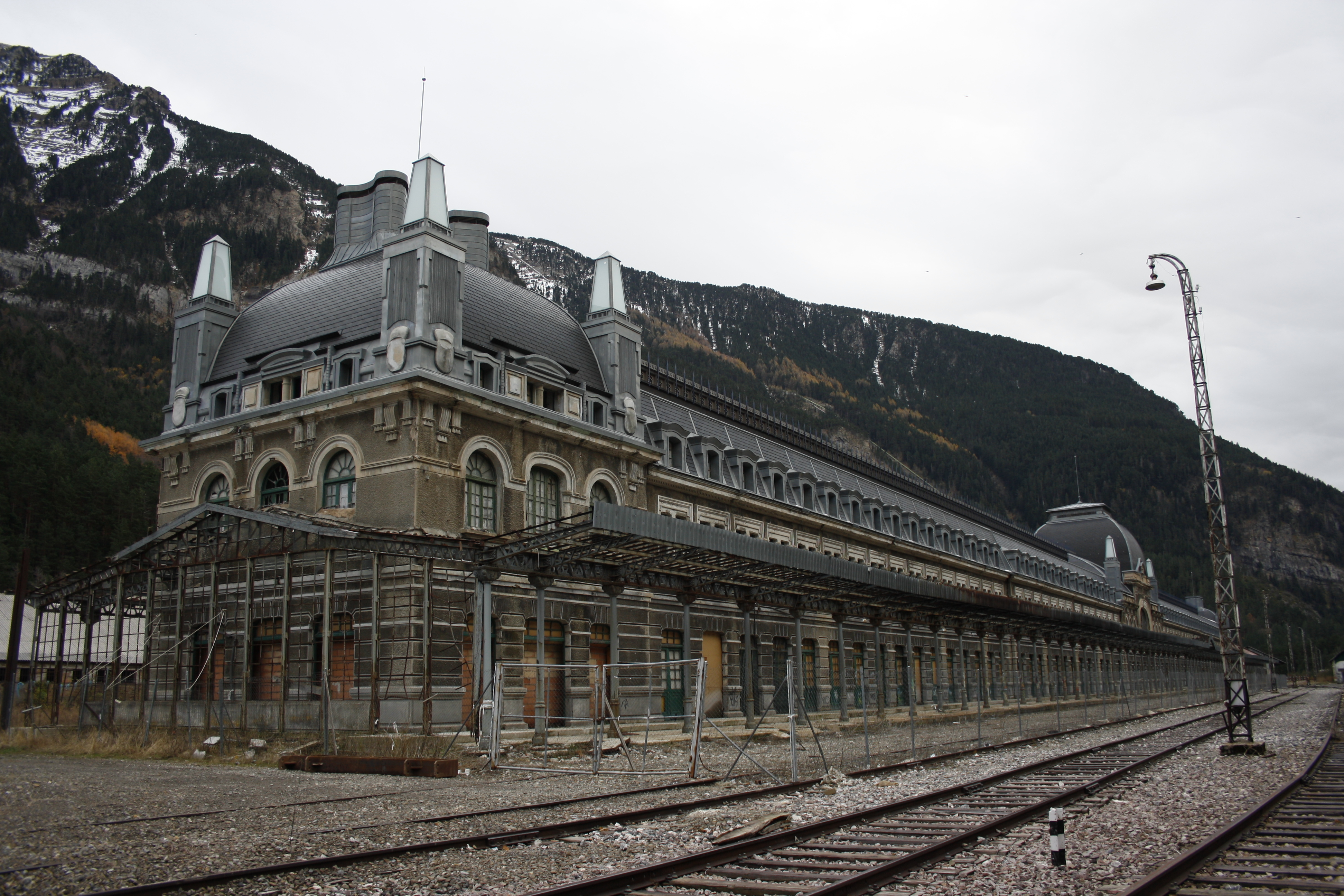 Vista total de la estación